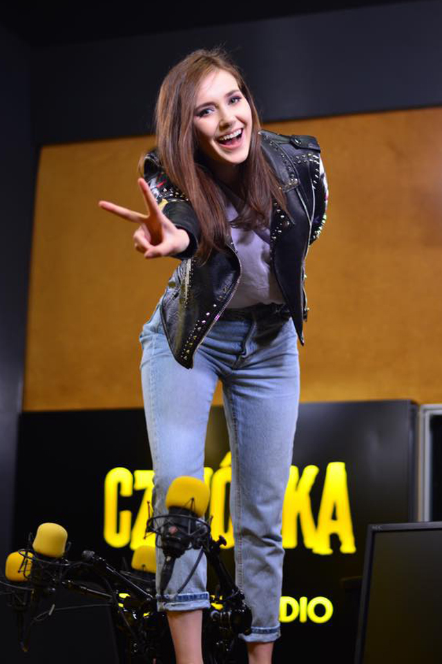 Klaudia Tyszkiewicz- prowadzącą audycję „Teraz k-pop!” emitowaną na antenie Czwórki Polskiego Radia.